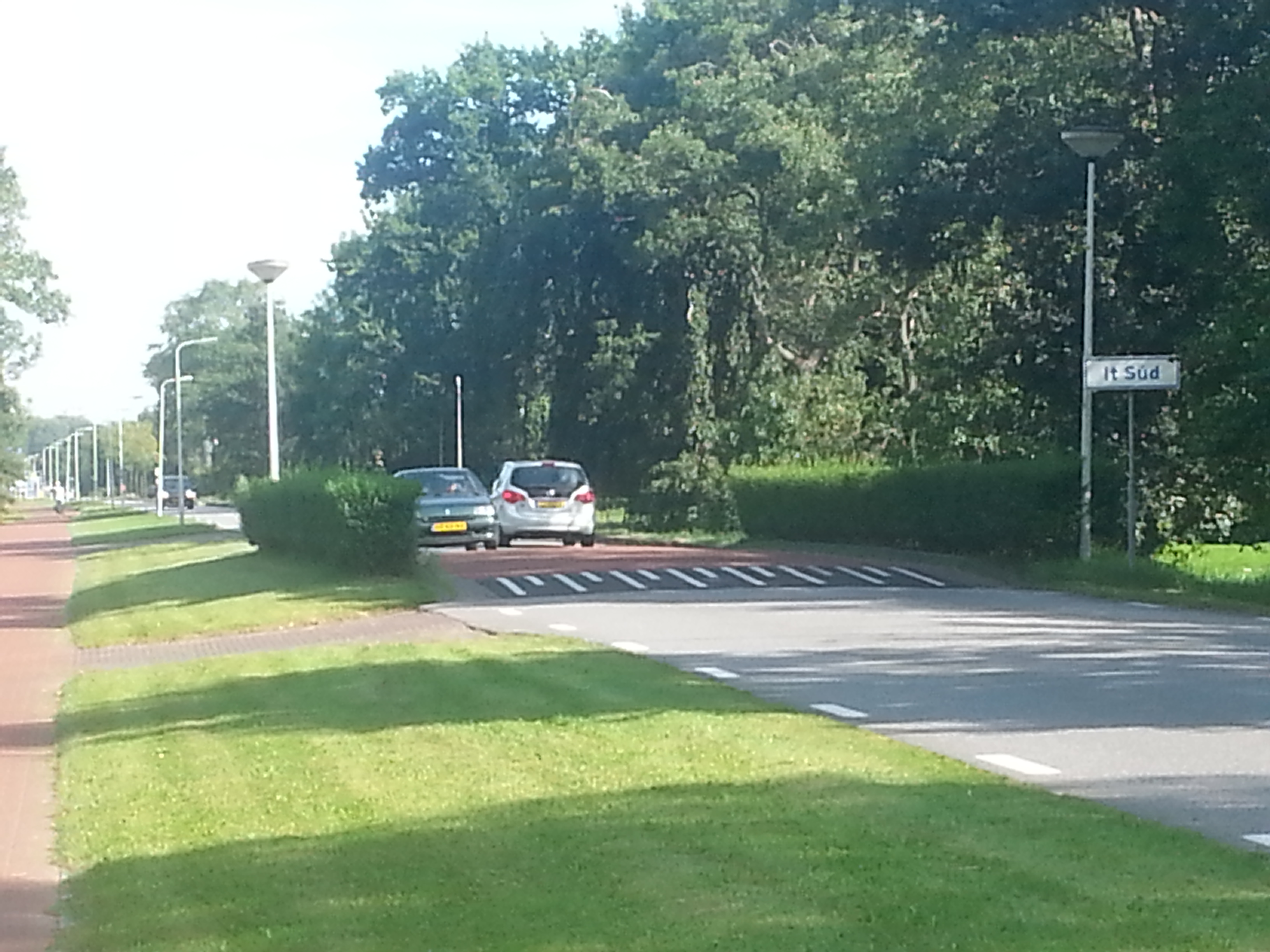 Het buurtschapje It Súd in de gemeente Smallingerland, tijdens een fietstocht.